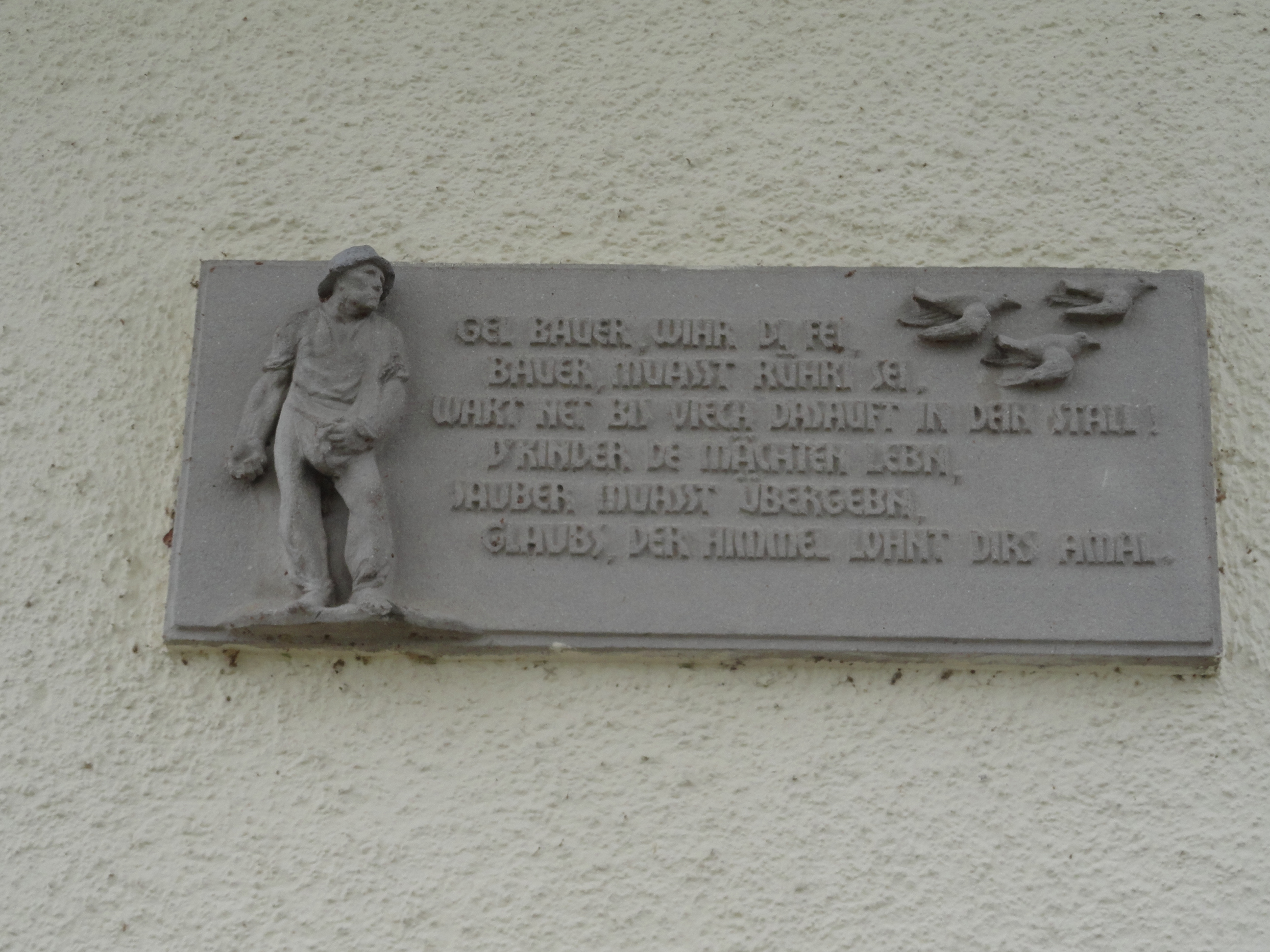 Schöpfwerk Mariaposching, erbaut 1933; Relieftafel